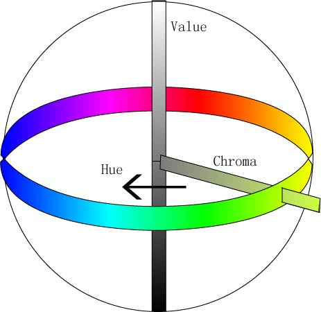 Munsell Color System